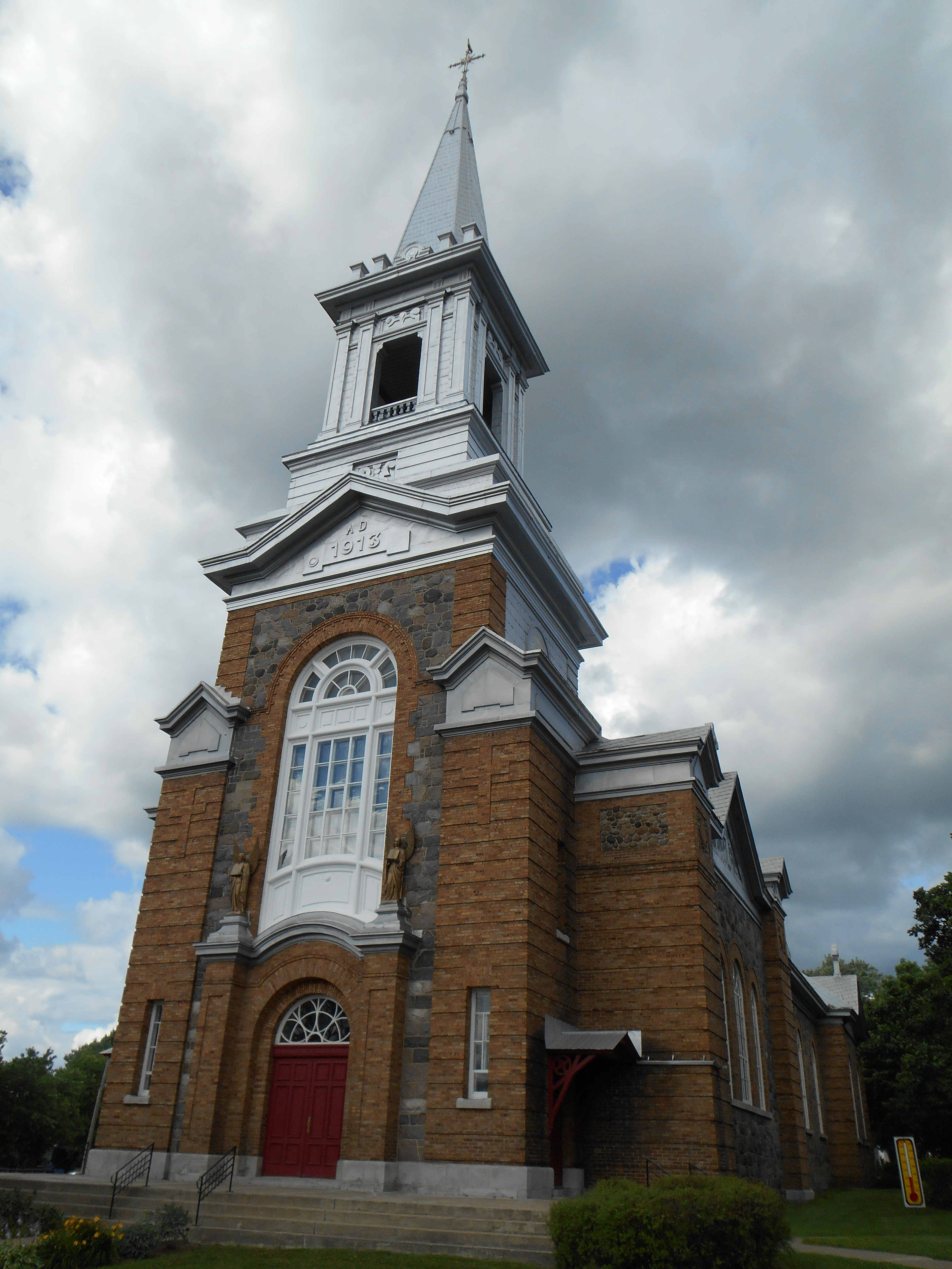 Église Saint-Apollinaire, 98, rue Principale, Saint-Apollinaire, Québec